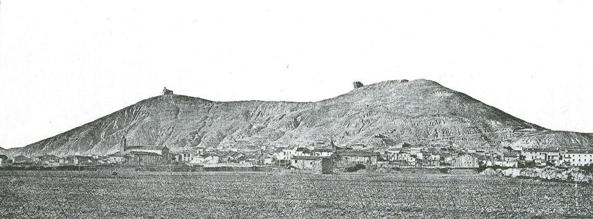 Ayerbe en el siglo XIX autor: Desconocido Esta imagen de Ayerbe está tomada en el año 1882. La curiosidad de la foto, además de su antigüedad, nos revela una iglesia con torre hoy desaparecida. Categoría:España (imagen)